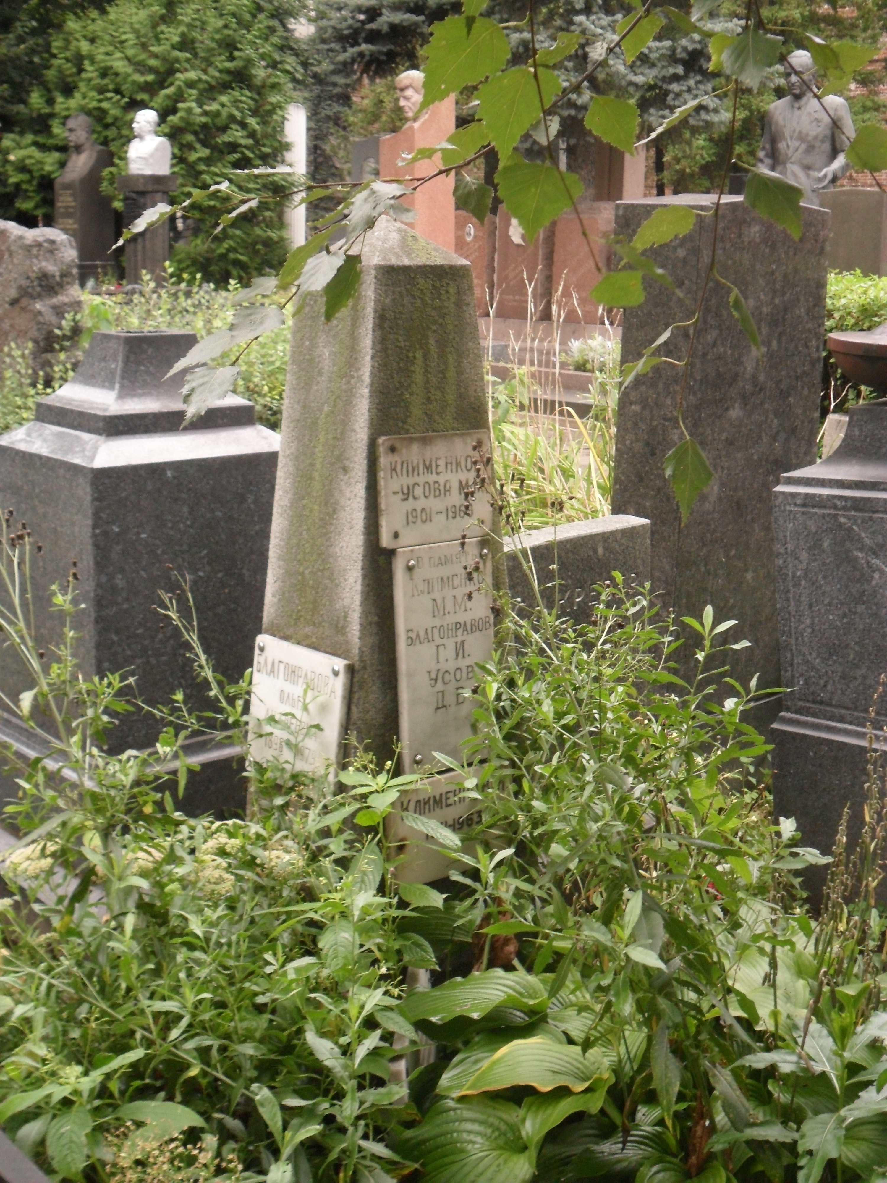 Кенотаф репрессированному государственному деятелю Георгию Благонравову на Новодевичьем кладбище Москвы.